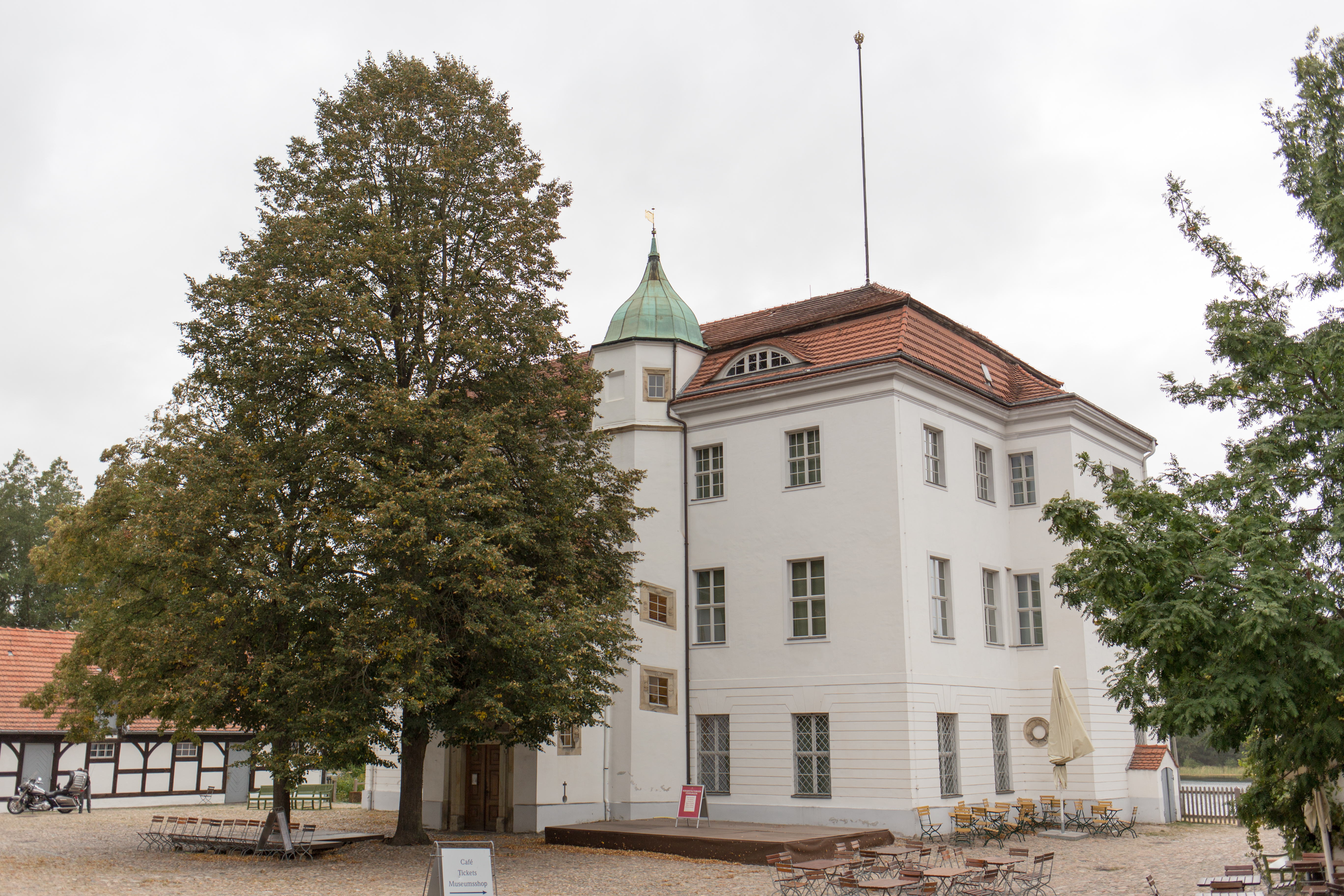 GLAM-on-Tour: Jagdschloss Grunewald Wikipedianer fotografierten am 21., 22. und 23. September 2018 im Jagdschloss Grunewald. This photo was taken during a project supported by WMDE. Gefördert von / Supported by: Wikimedia Deutschland, Stiftung Preußische Schlösser und Gärten Jagdschloss Grunewald vom Innenhof gesehen.